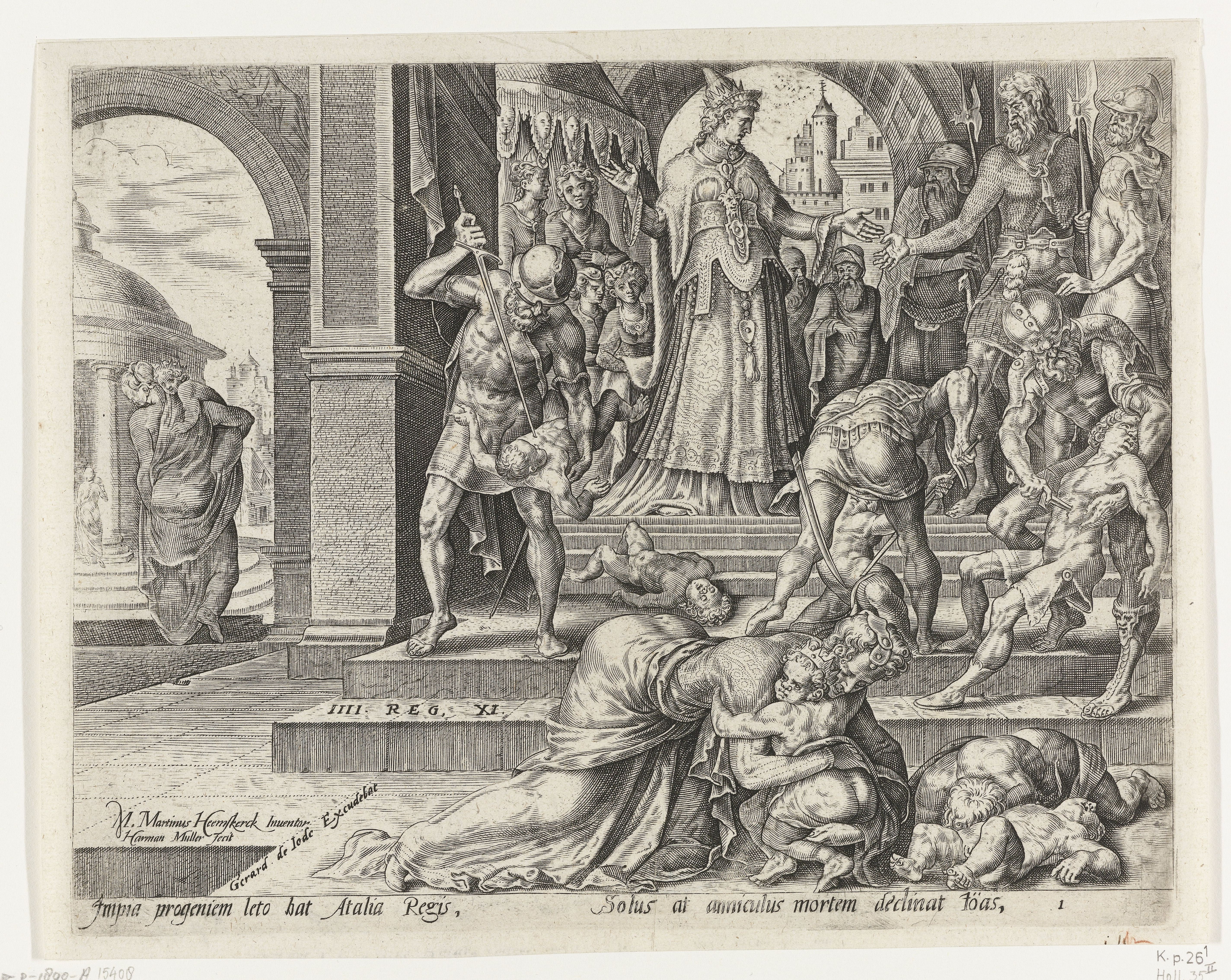 IdentificatieTitel(s): Koningin Atalja laat de koningskinderen dodenGeschiedenis van Joas en koningin Atalja (serietitel)Objecttype: prent Serienummer: 1/4Objectnummer: RP-P-1890-A-15408Catalogusreferentie: New Hollstein Dutch 29-1(2)Opmerking: Harmen Jansz. MullerNew Hollstein Dutch 139-1(2)Opmerking: Maarten van HeemskerckOpschriften / Merken: verzamelaarsmerk, verso, gestempeld: Lugt 2228Omschrijving: Atalja, die hoorde dat haar zoon koning Achazja was omgekomen, geeft opdracht om alle koningskinderen te doden, zodat zij koningin kan worden. Op de trap doden soldaten de kinderen. Links en voor de trap wordt in twee scenes Achazja's zoon Joas door zijn tante gered. Op de trap een verwijzing naar de Bijbeltekst in 2 Kon. 11. Onderaan in de marge een vers in het Latijn over de voorstelling.VervaardigingVervaardiger: prentmaker: Harmen Jansz Muller (vermeld op object)naar tekening van: Maarten van Heemskerck (vermeld op object)schrijver: Hadrianus Juniusuitgever: Gerard de Jode (vermeld op object)Plaats vervaardiging: prentmaker: Amsterdamuitgever: AntwerpenDatering: 1565 - 1569 en/of 1585Fysieke kenmerken: gravureMateriaal: papier Techniek: graveren (drukprocedé)Afmetingen: plaatrand: h 191 mm × b 243 mmToelichtingPrent mogelijk gebruikt in: Thesaurus sacrarum historiarum veteris testamenti (...). Antwerpen: Gerard de Jode, 1585.OnderwerpWat: Athaliah has all the members of the royal family killedJoash is rescued by his aunt JehoshebaVerwerving en rechtenVerwerving: aankoop apr-1890Copyright: Publiek domein